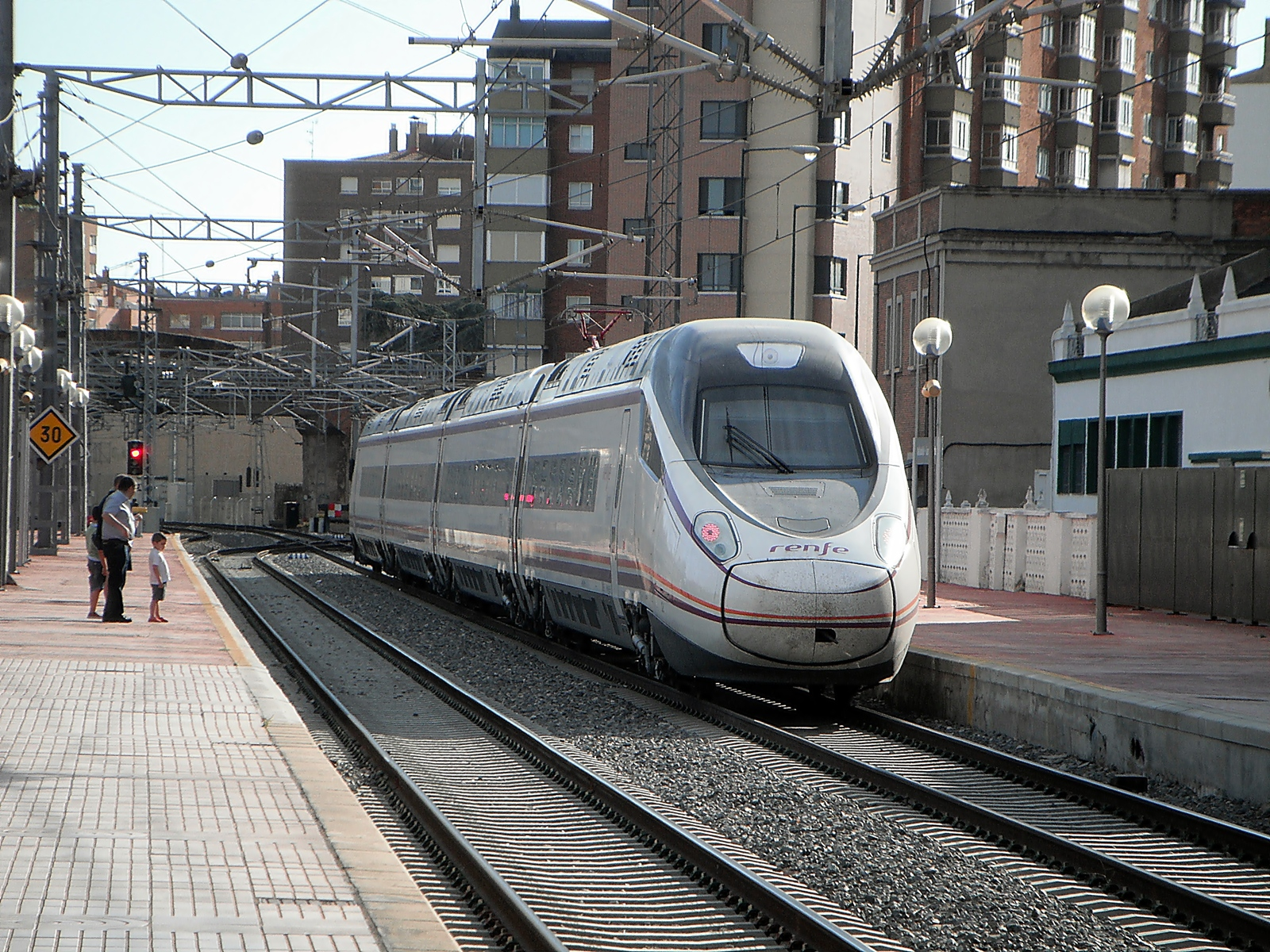 Tren de la serie 114 "Velocirraptor" efectuando el servicio Renfe Avant Valladolid-Madrid, saliendo de la estación vallisoletana